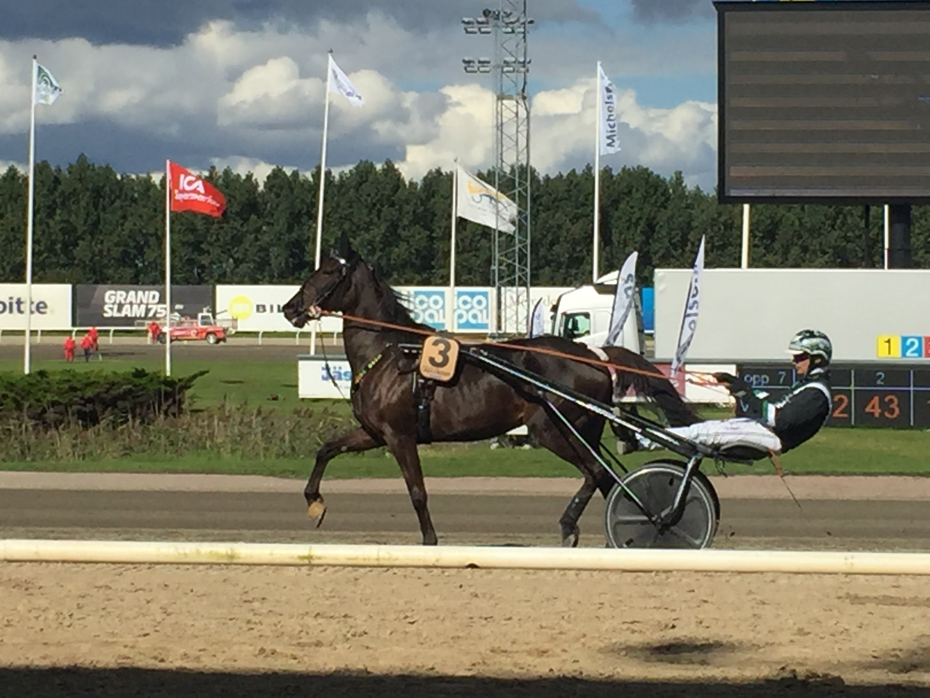 Johnny Takter och hästen Cash Crowe inför finalen av Derbystoet på Jägersro den 3 september 2017.